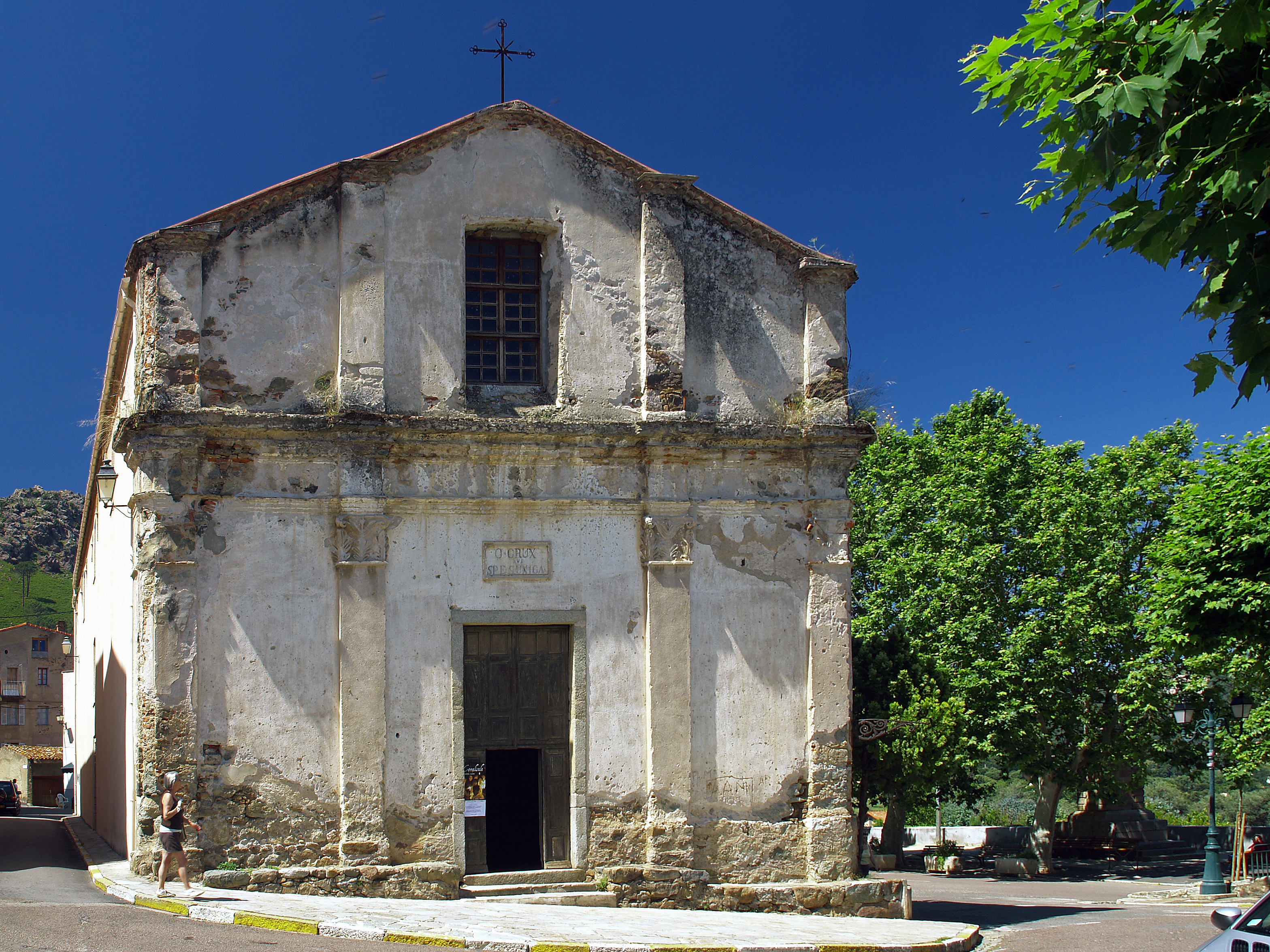 Calenzana - Confrérie Sainte-Croix